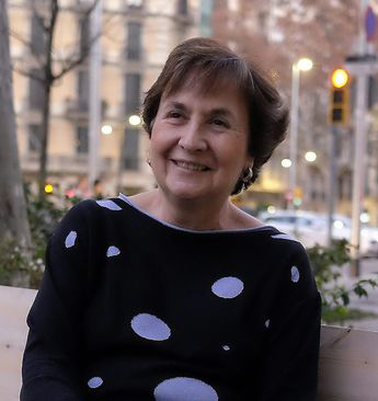 Maravillas Rojo